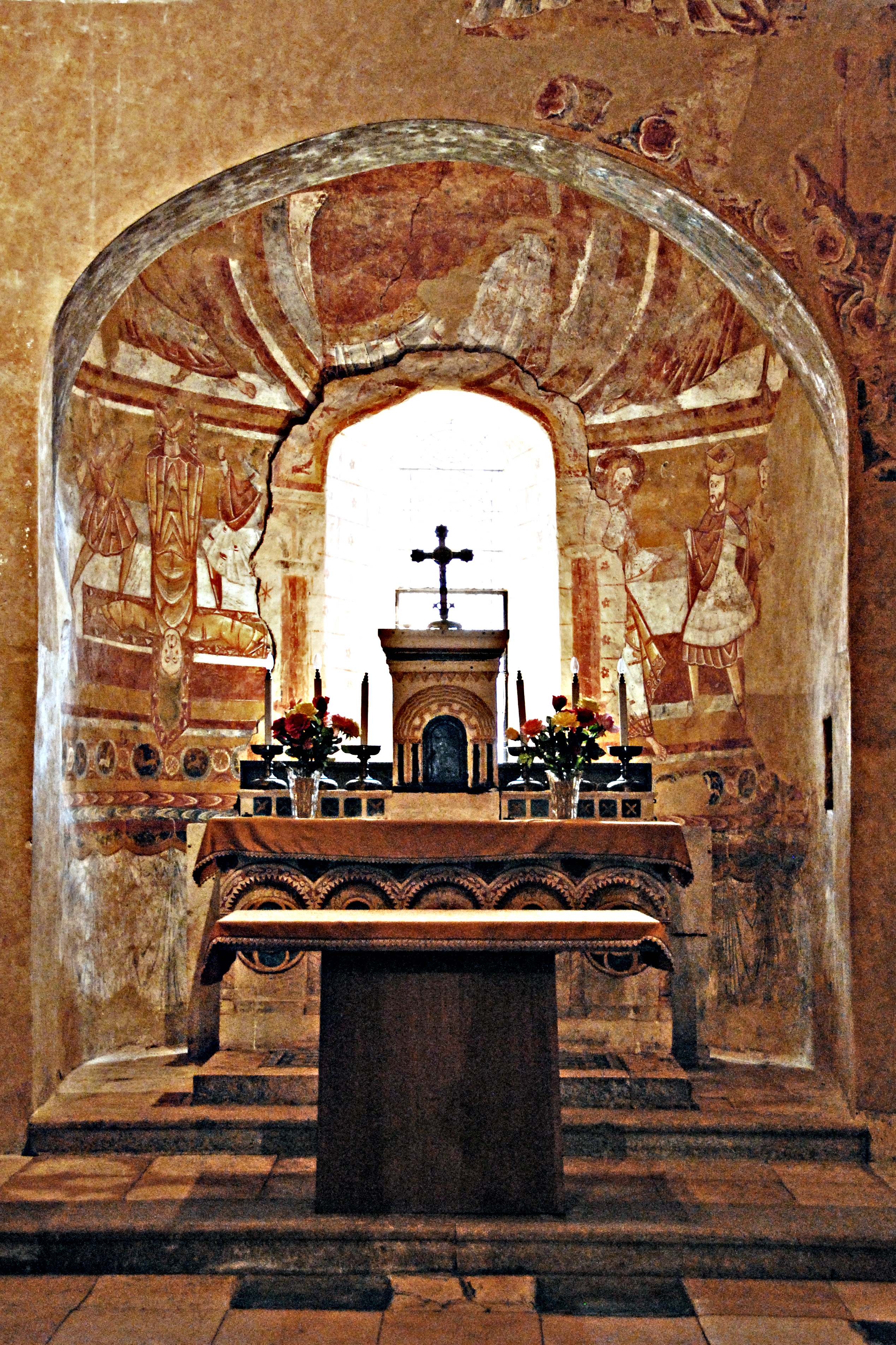 Chor, Chorapsis, Überblick